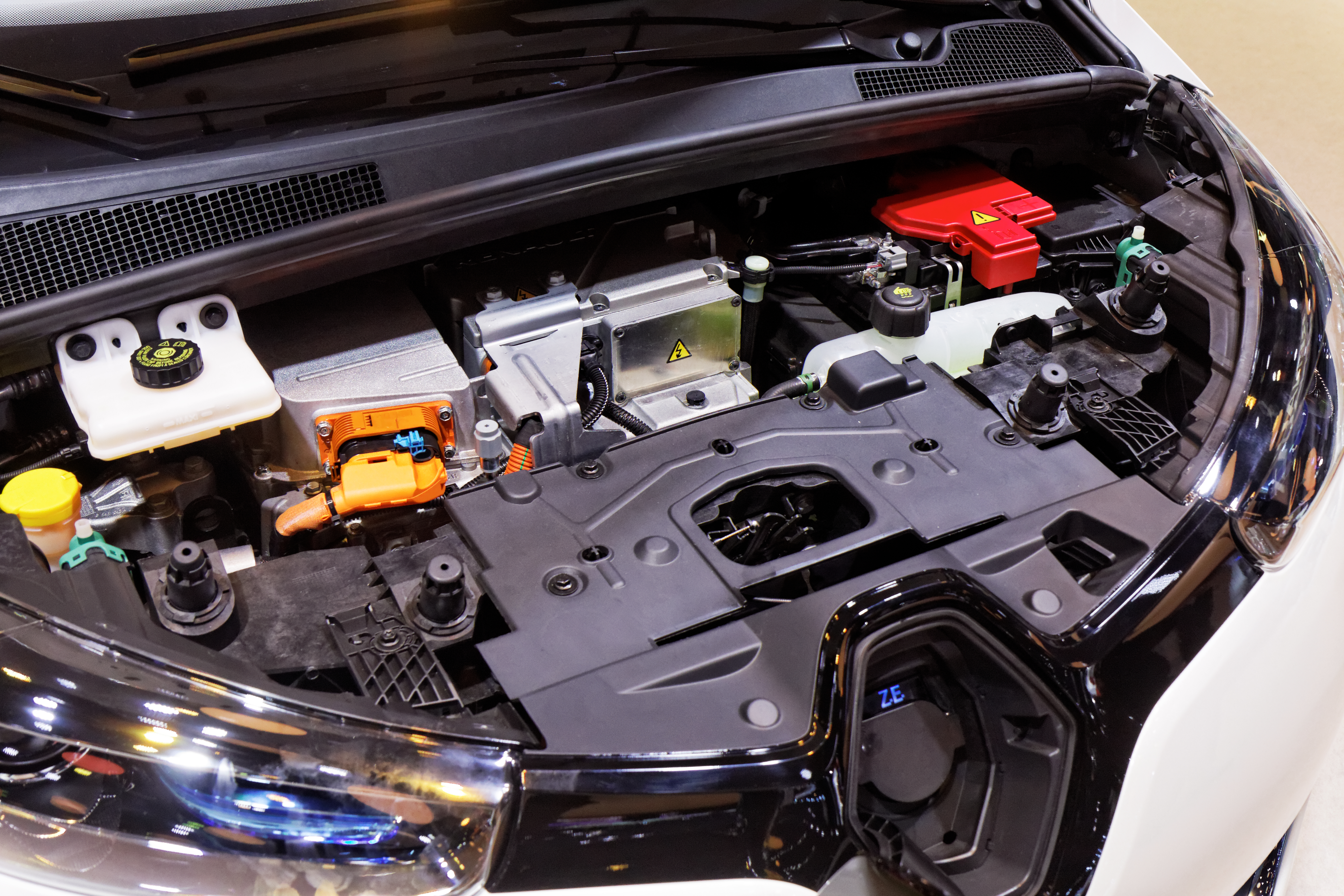 Une Renault Zoe présentée lors du Mondial de l'Automobile de Paris 2012.